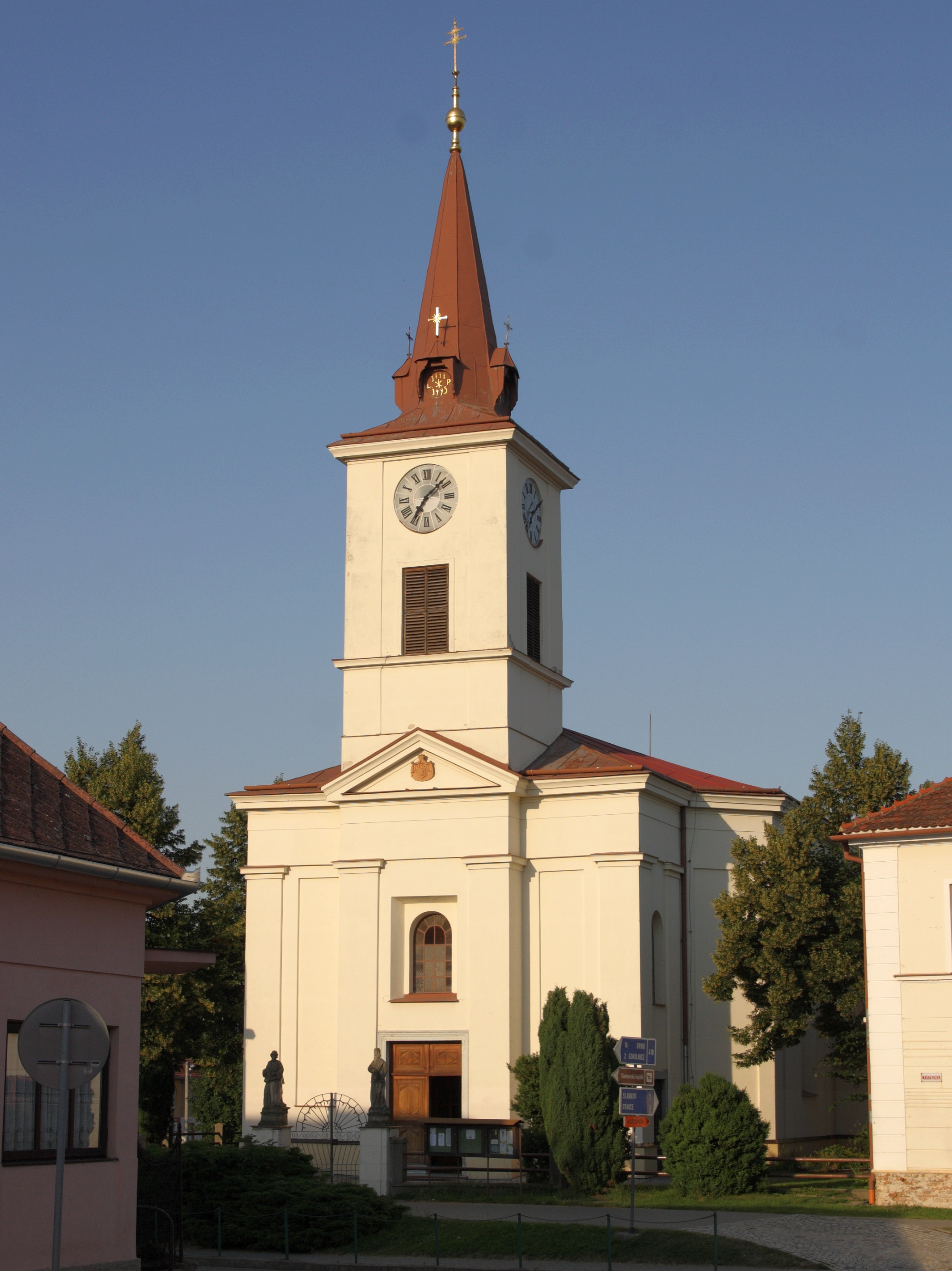 Újezd u Brna - kostel sv Petra a Pavla.